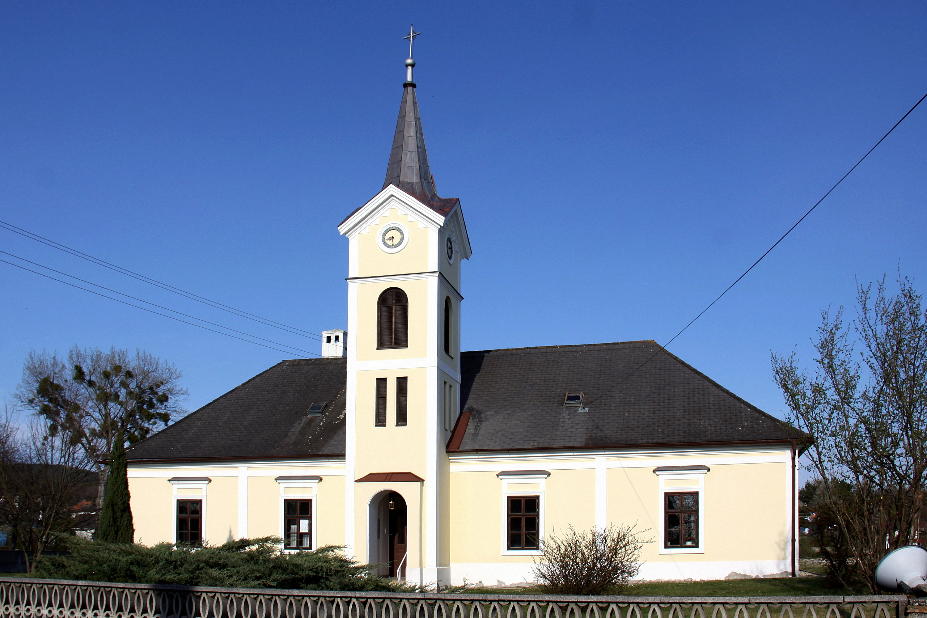 Markt Neuhodis - Evangelisches Schul- und Bethaus Object location47° 17′ 40.14″ N, 16° 23′ 51.04″ E